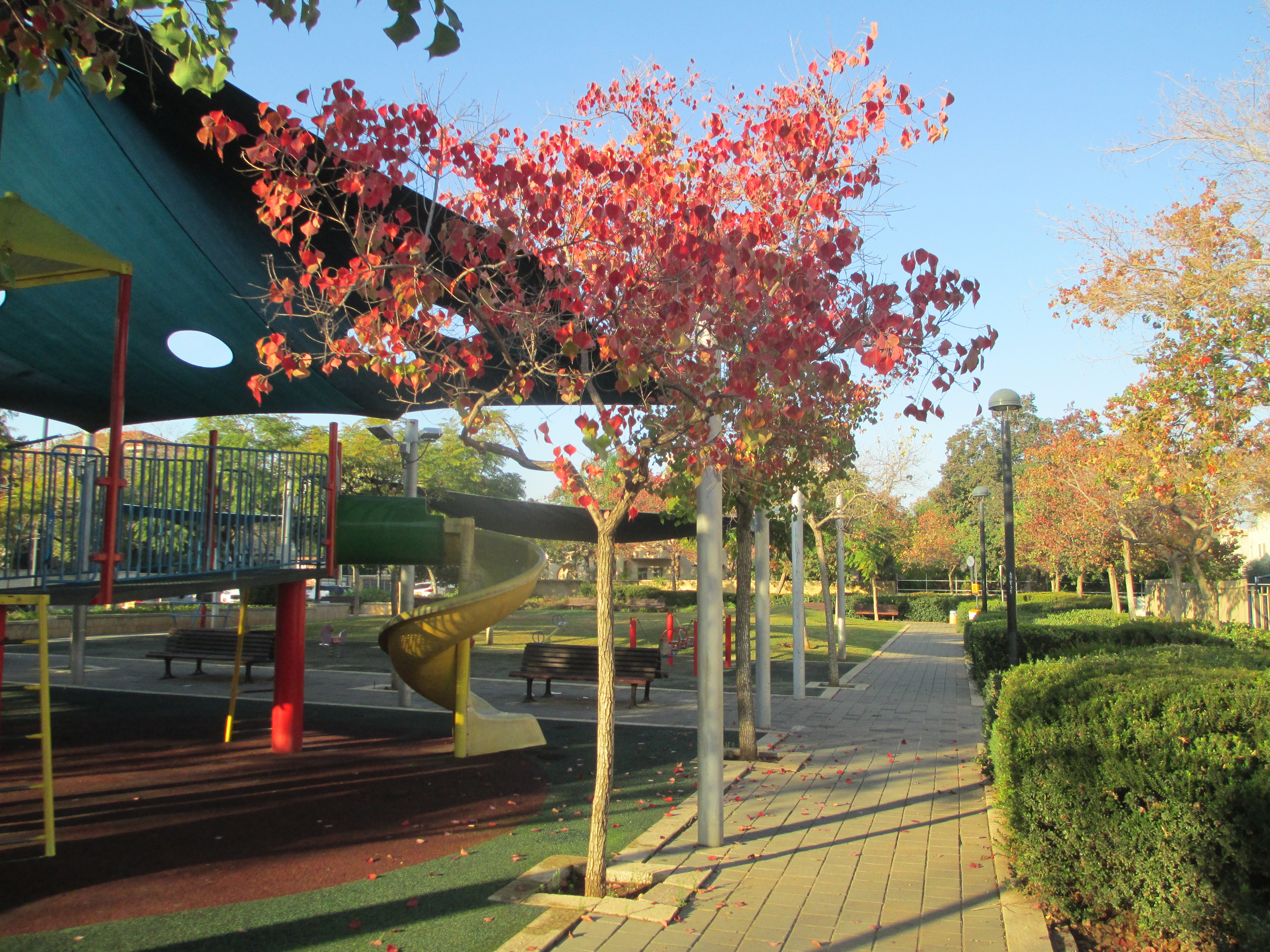 עץ ספיון השעווה בצבעי שלכת בפתח תקווה